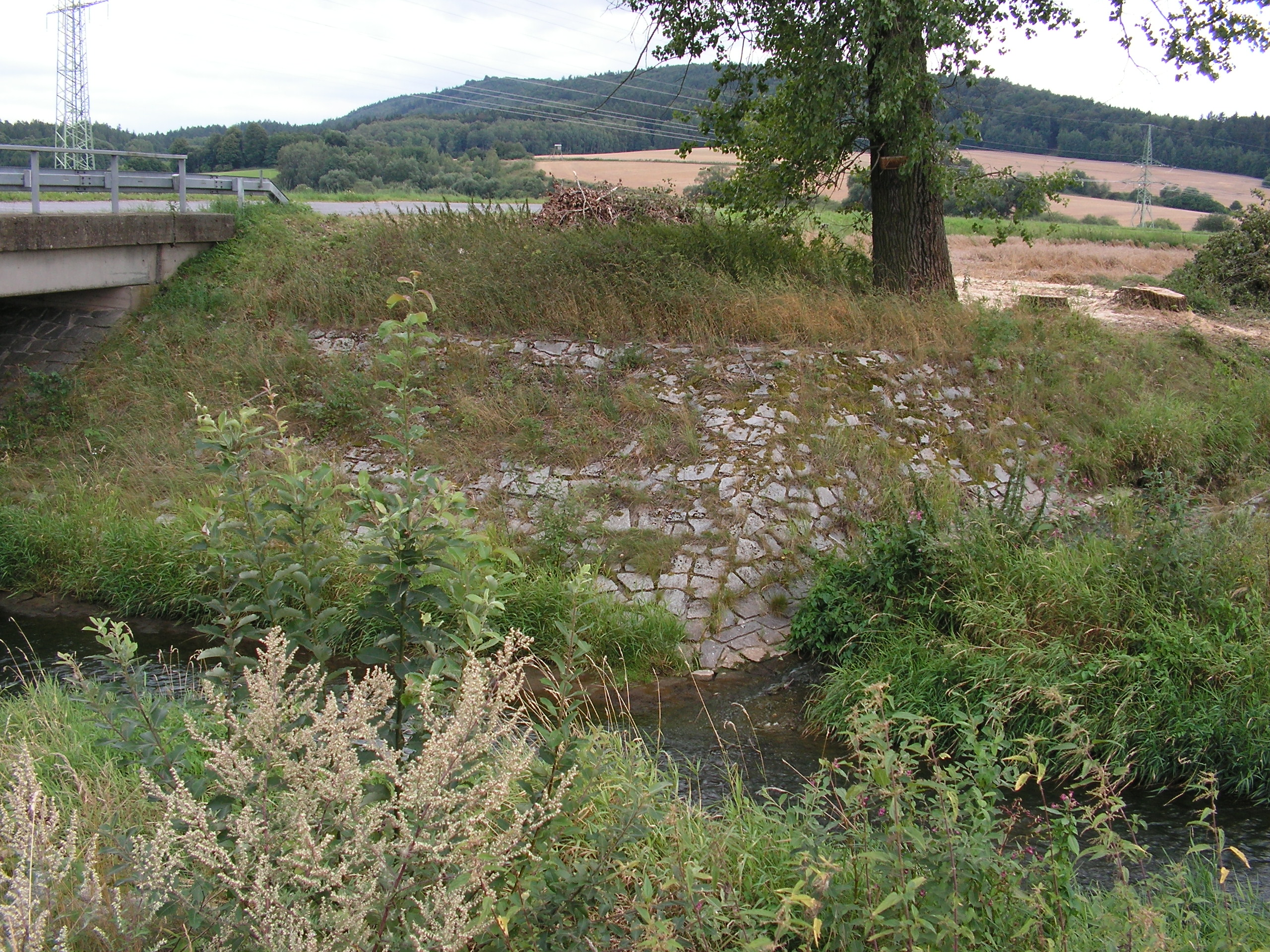 Ústí Rychnovského potoka do Moravské Sázavy pod hrází poldru Žichlínek